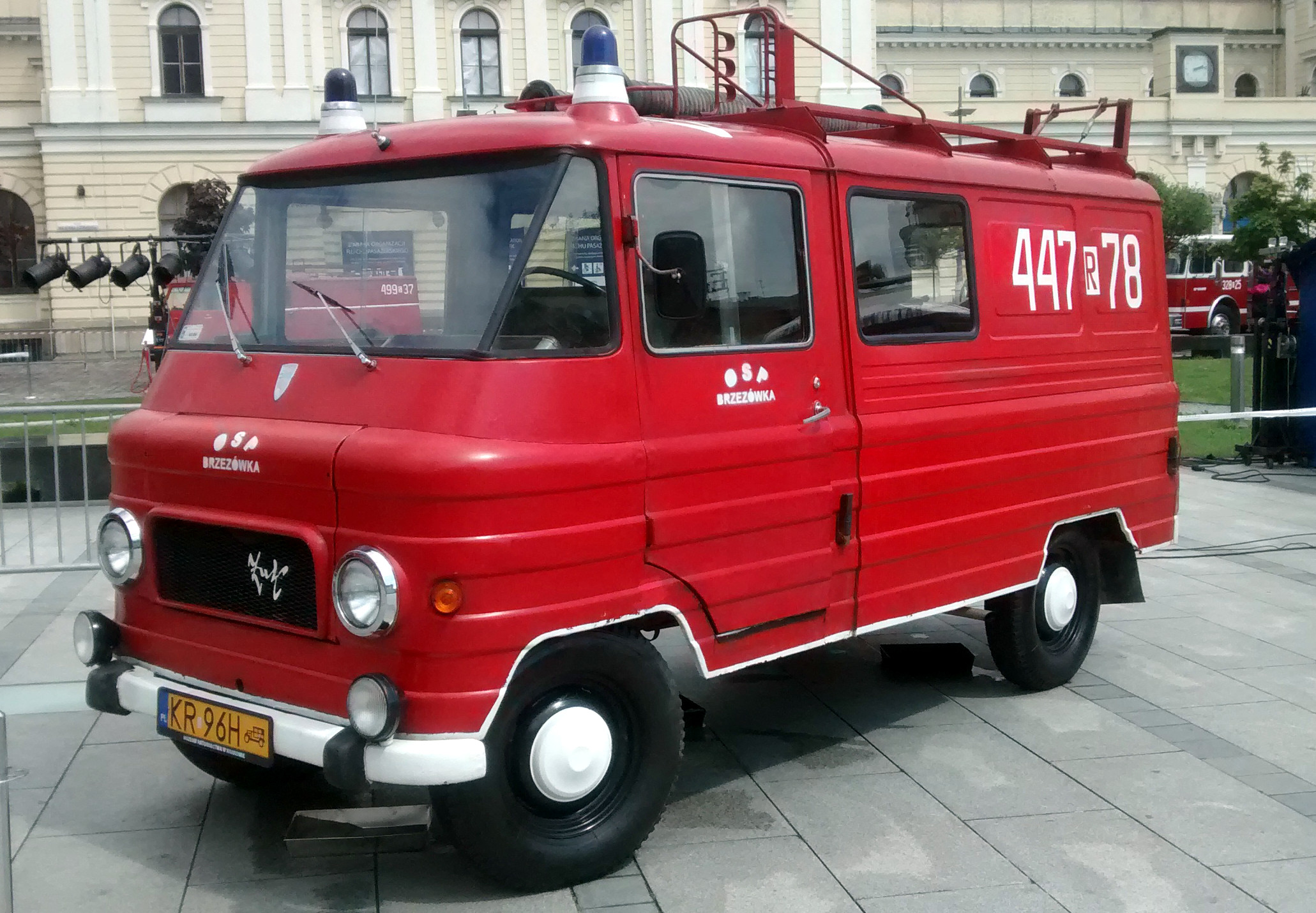 Żuk A-15 na wystawie wozów strażackich w Krakowie.